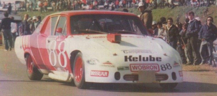 Ford Fairlane presentado por Norberto Bressano en la década del '80